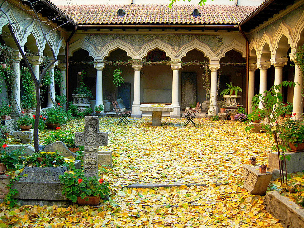 Stavropoleos yard.